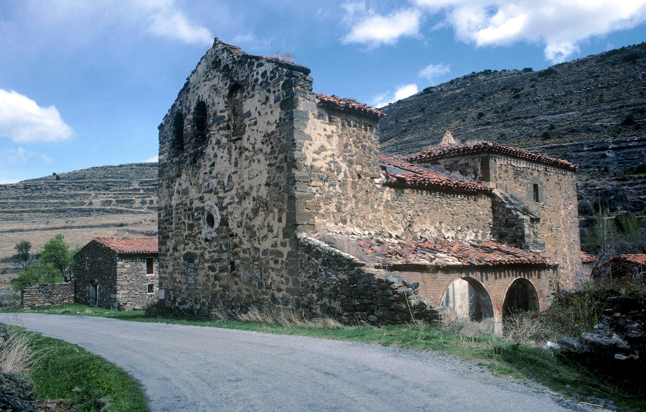 Iglesia de la Virgen de los Remedios, del siglo XVII. Se encontraba en Las Ruedas de Enciso, aldea del municipio de Enciso en La Rioja (España). Ha sido derruida por las obras de un pantano. La foto fue tomada en 1990.